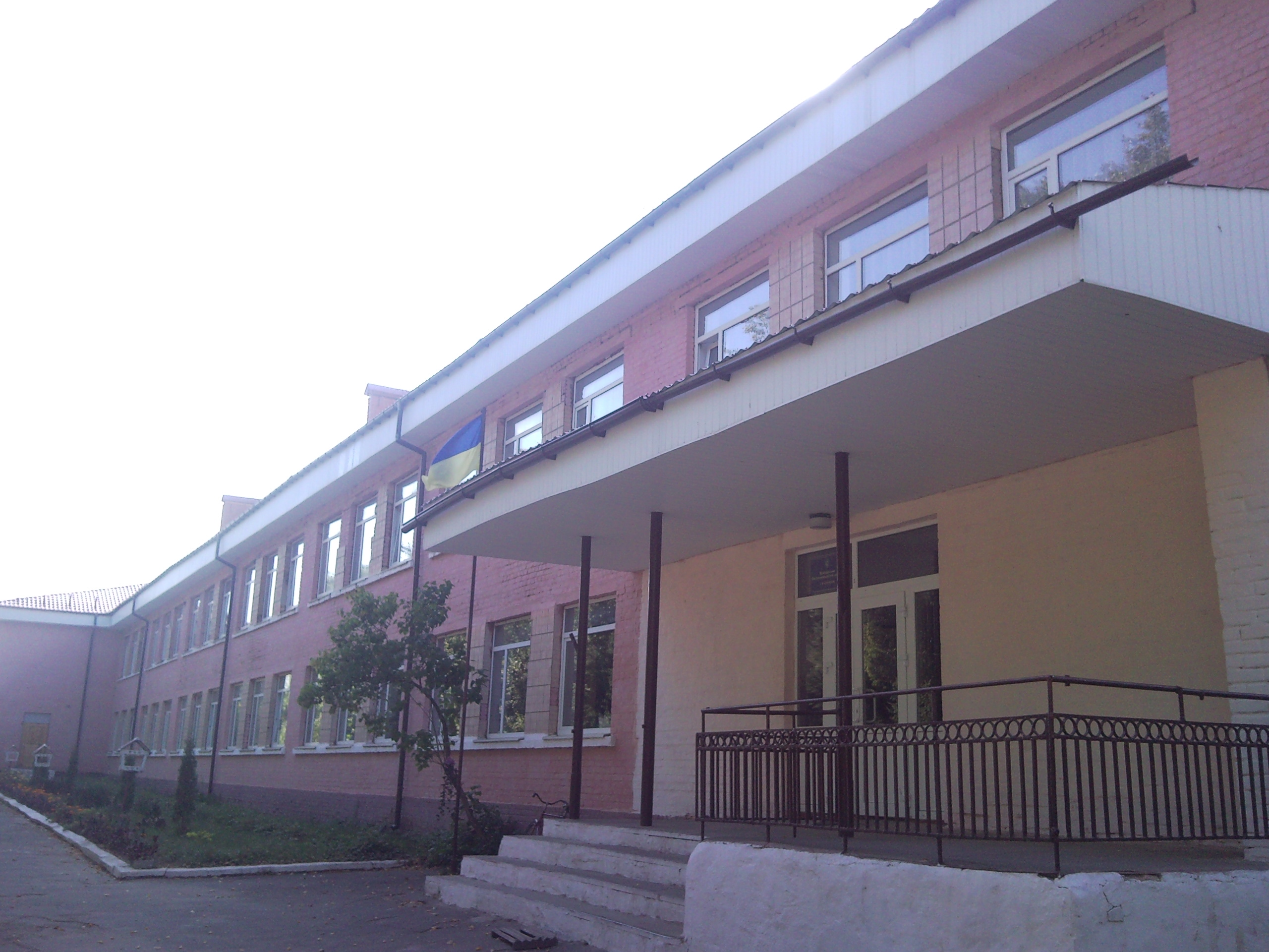 Яришівка Школа